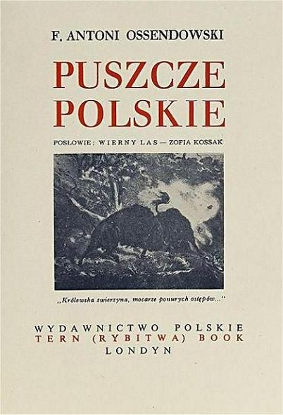 Strona tytułowa książki Ferdynarda Ossendowskiego "Puszcze polskie", Wydawnictwo Polskie Tern (Rybitwa) 1953